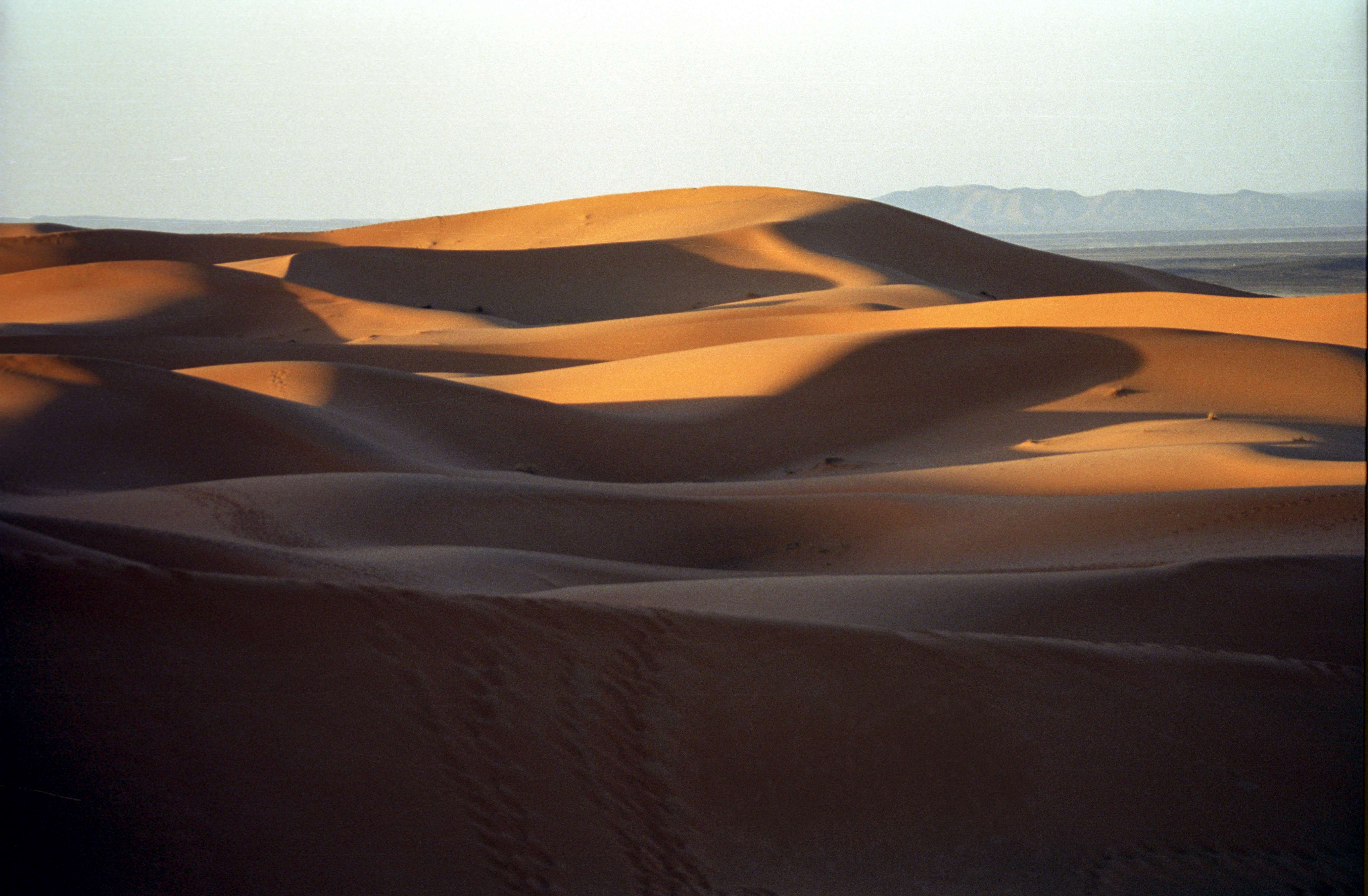 Erg Chebbi